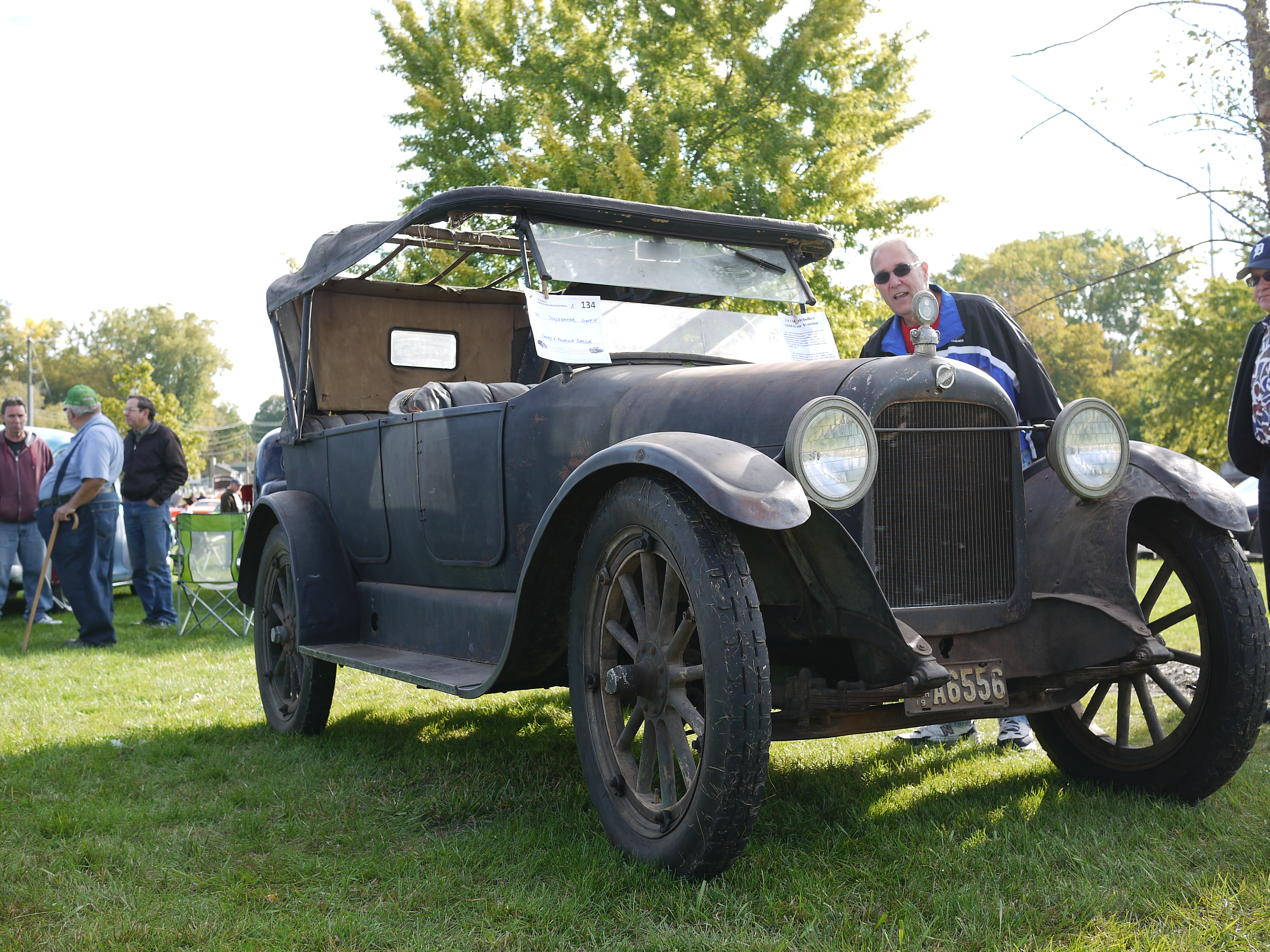 1919 Studebaker Light 4